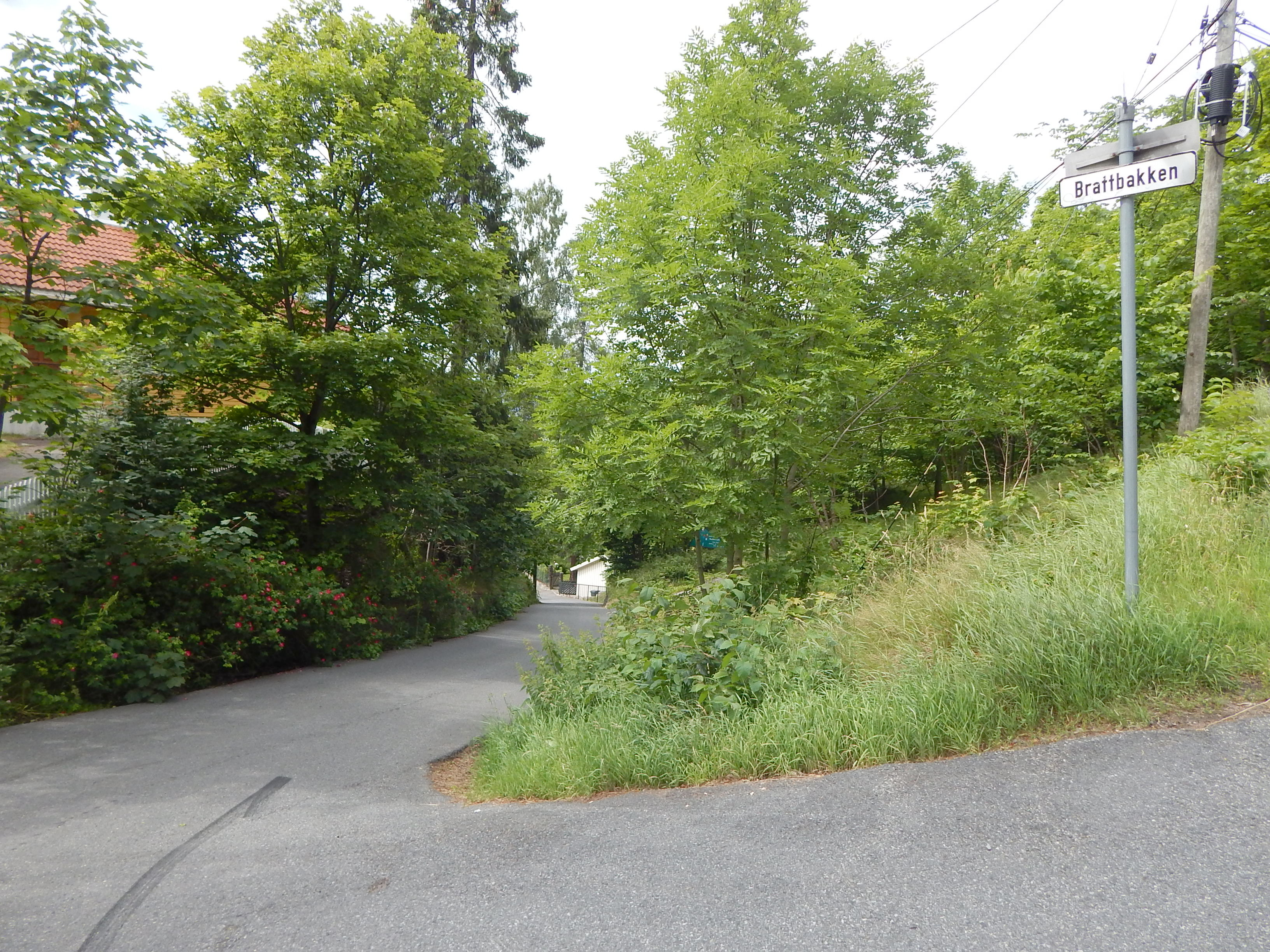 Brattbakken sett fra Bekkelagsveien